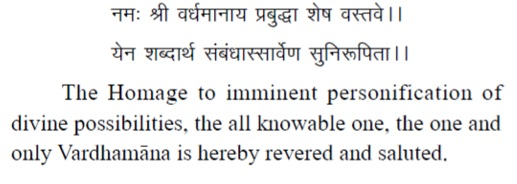 शक्तिमान ने तीर्थंकर महावीर को श्रद्धांजलि देकर अपना काम शुरू किया.